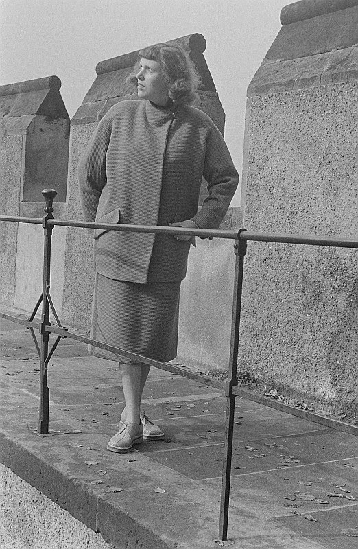 Original image description from the Deutsche Fotothek Renate Rössing posiert auf der Meißener Schloßbrücke